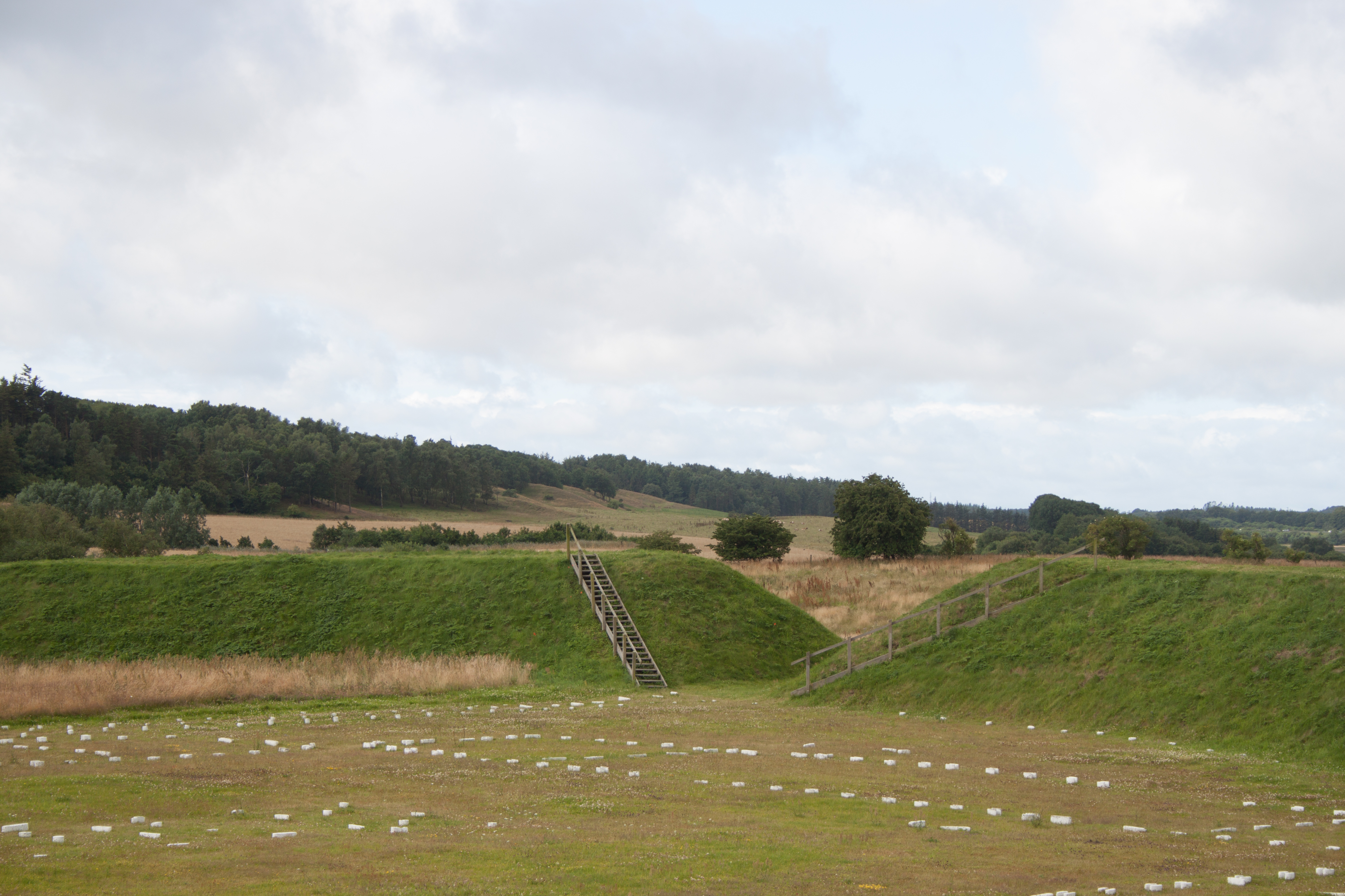 Viking fort Fyrkat